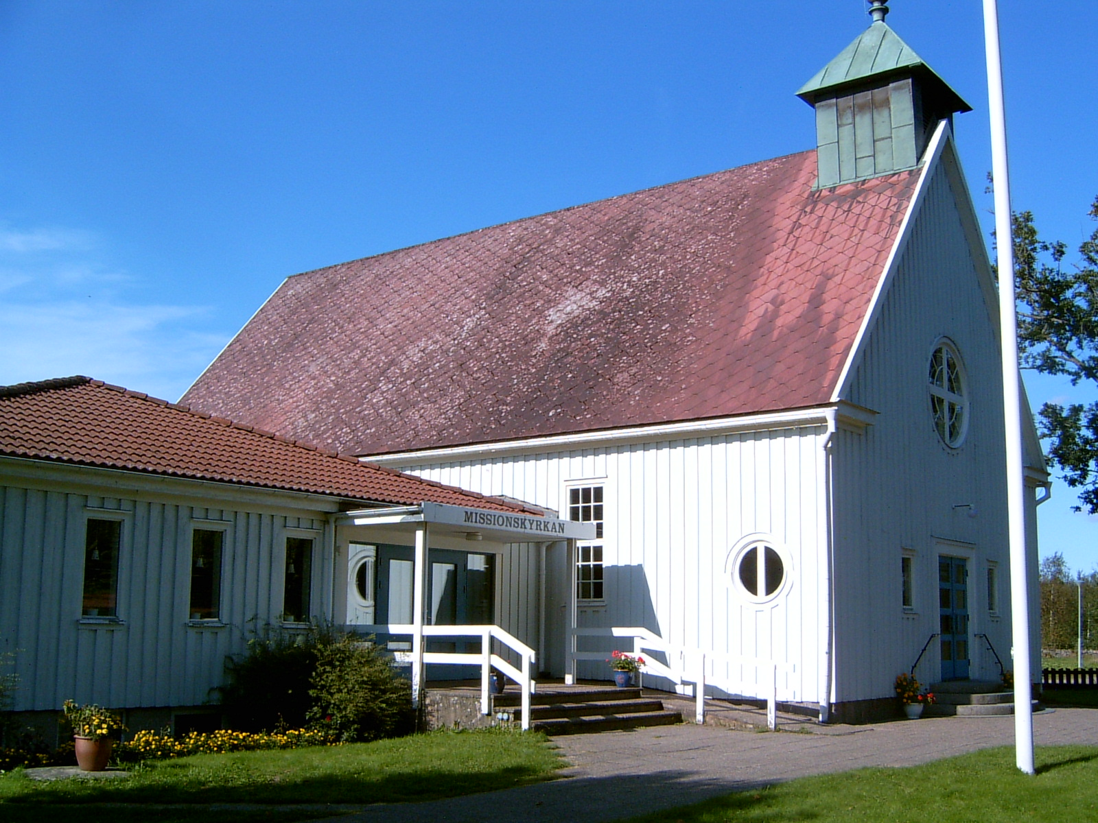 Asklanda-Ornunga Missionskyrka, 2006.